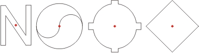 point symmetry